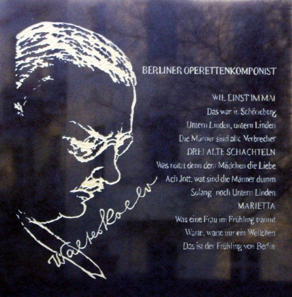 Gedenktafel am Ehrengrab Walter Kollos. (Foto wurde beschnitten und farbkorrigiert)